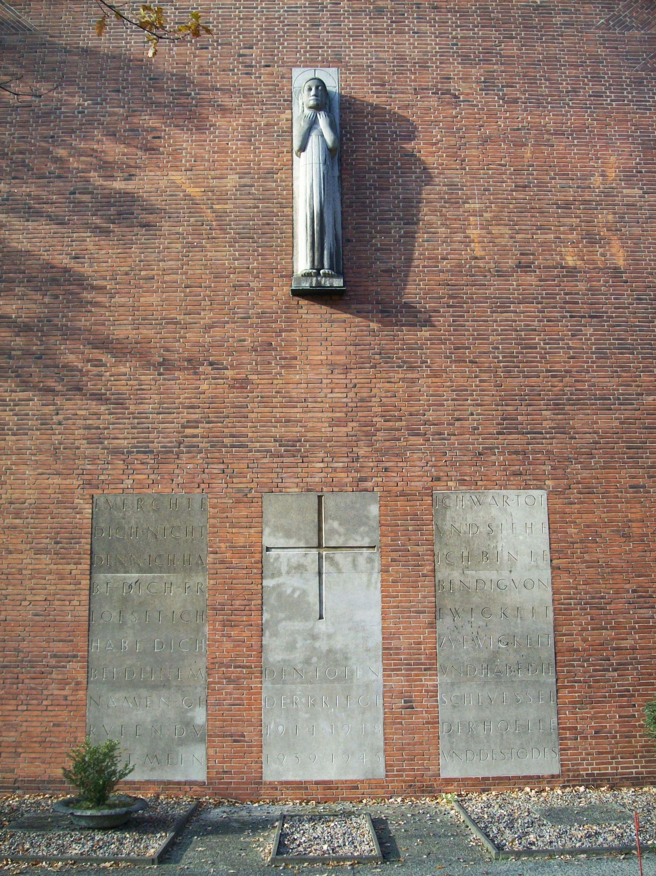 Borgfelde, Hamburg, Germany